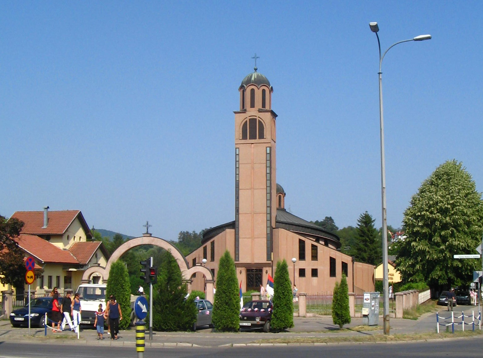 Rebrovacka_crkava